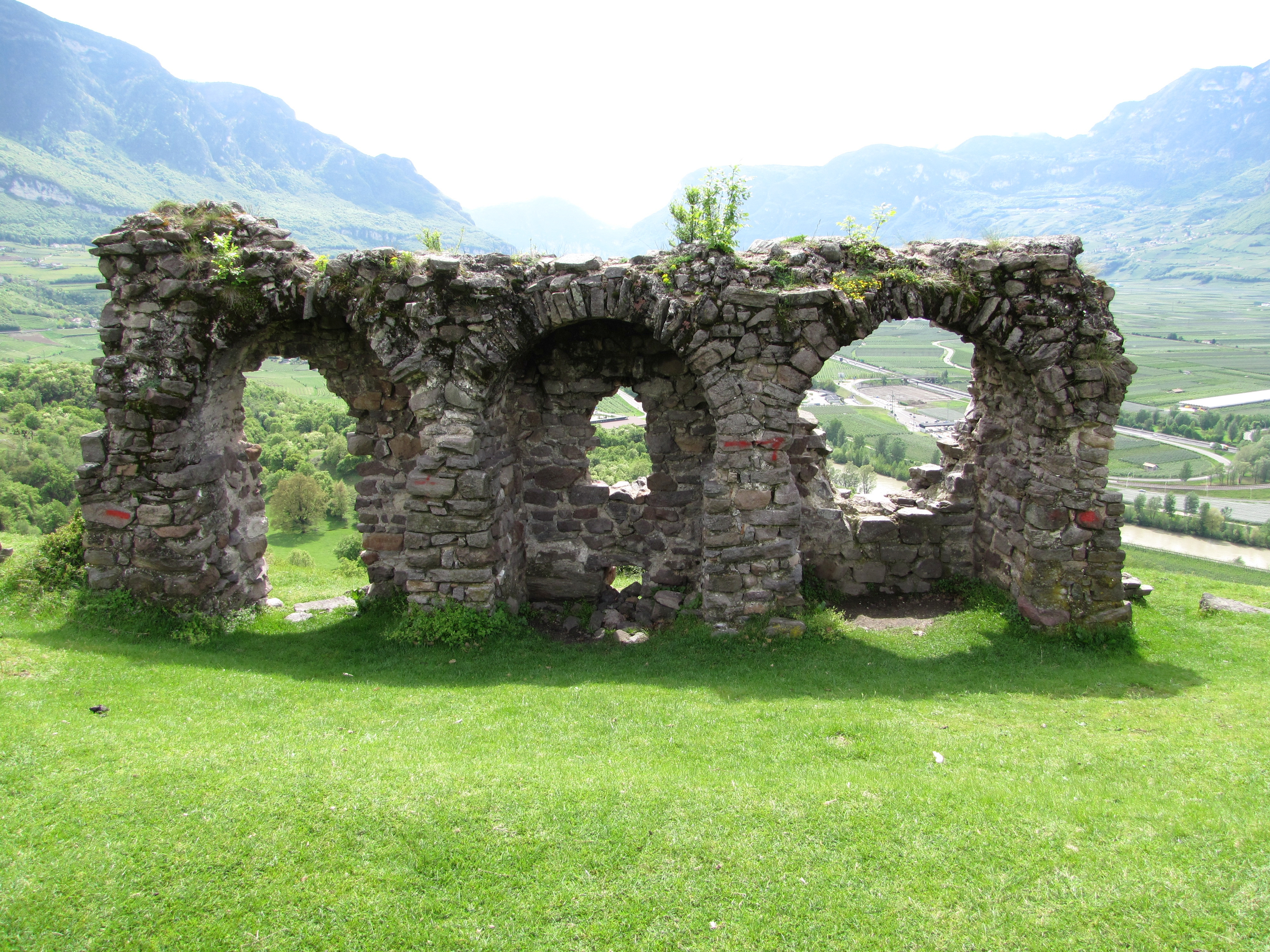 Castelfeder Kuchelen 2013